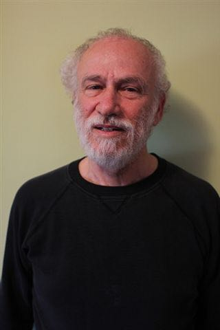 פרופסור ישראל כ"ץ